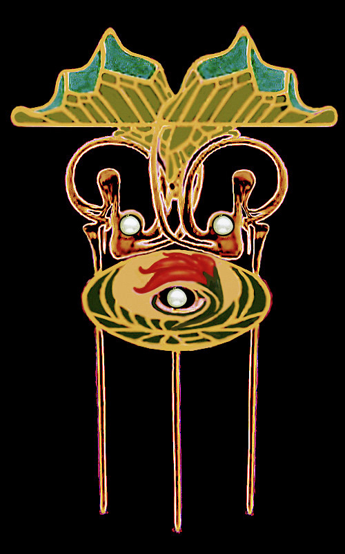 Art nouveau designed jewel. Joya diseñada de estilo modernista.